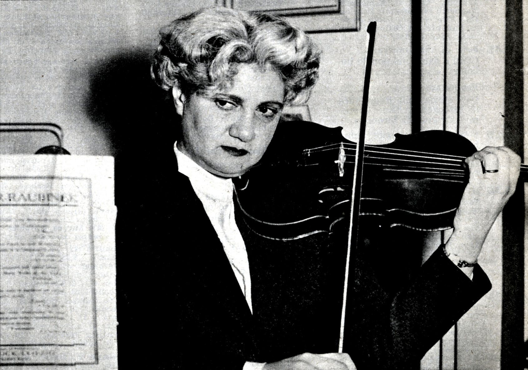 photo from magazine Radiocorriere (1961)